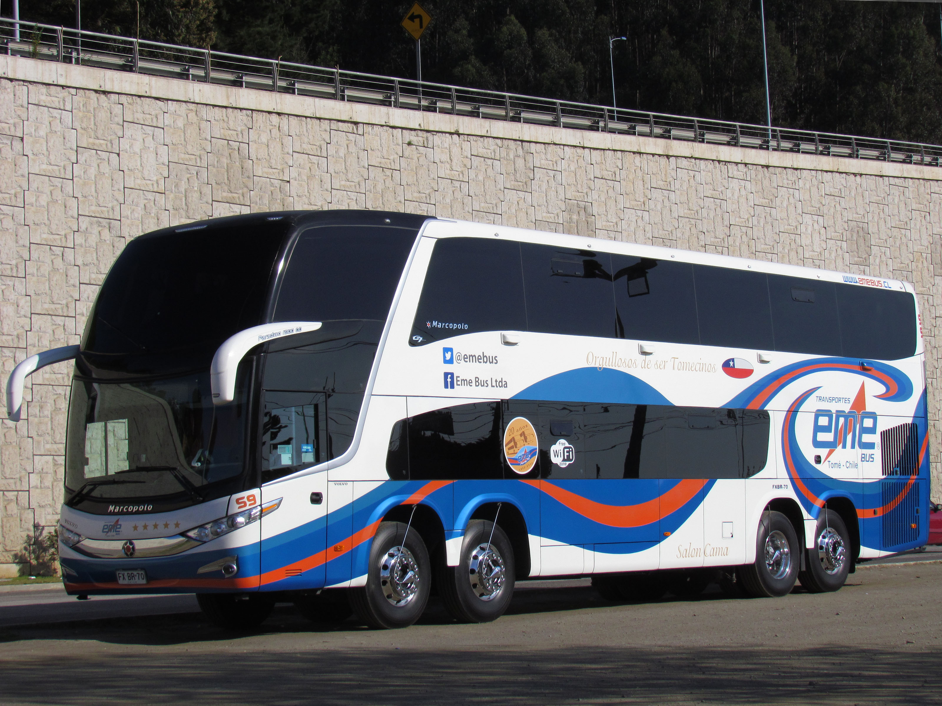 Double Decker